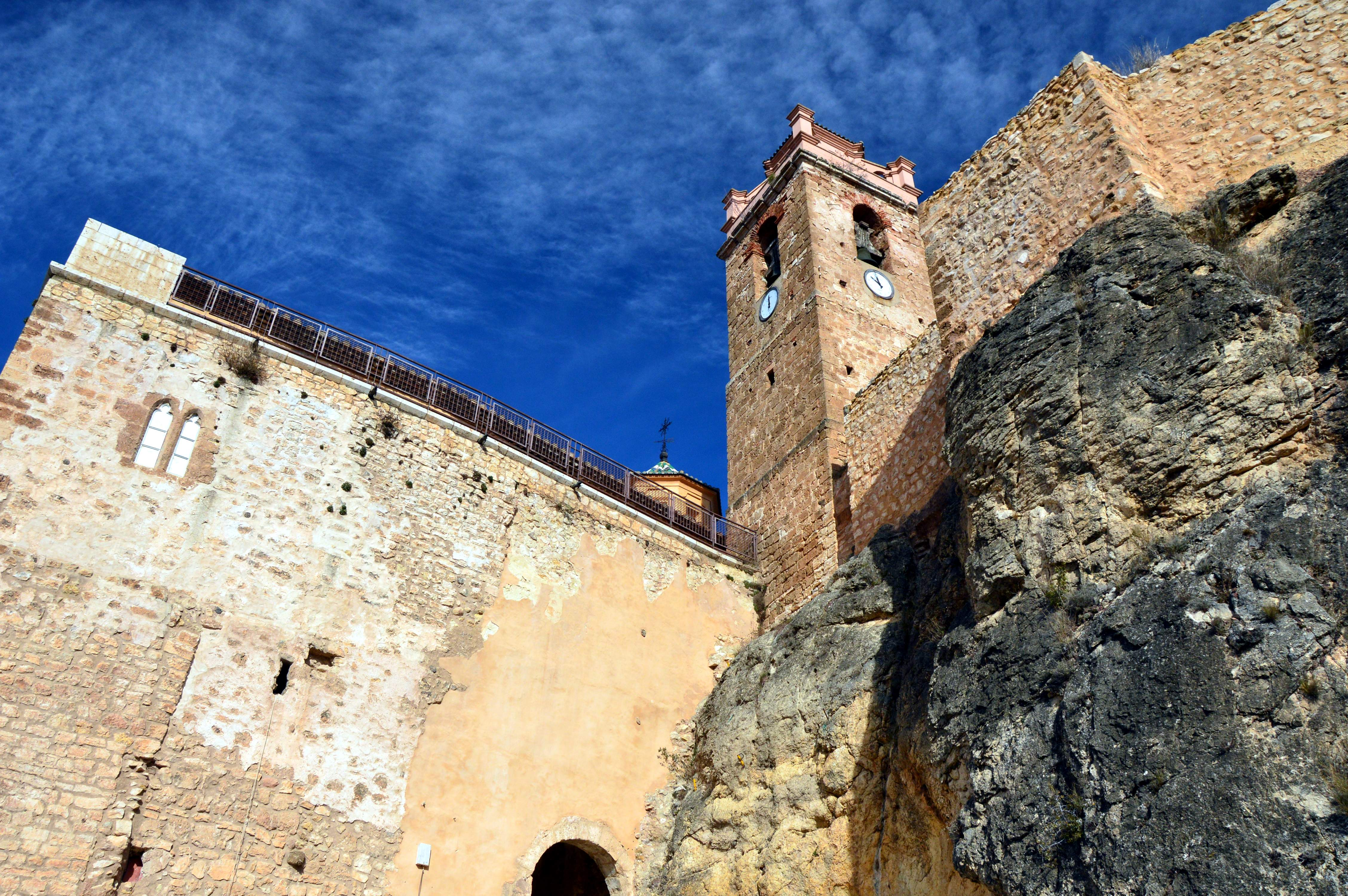 Iglesia-fortaleza de Castielfabib (Valencia), con detalle del campanario donde se hace el volteo humano (2019).